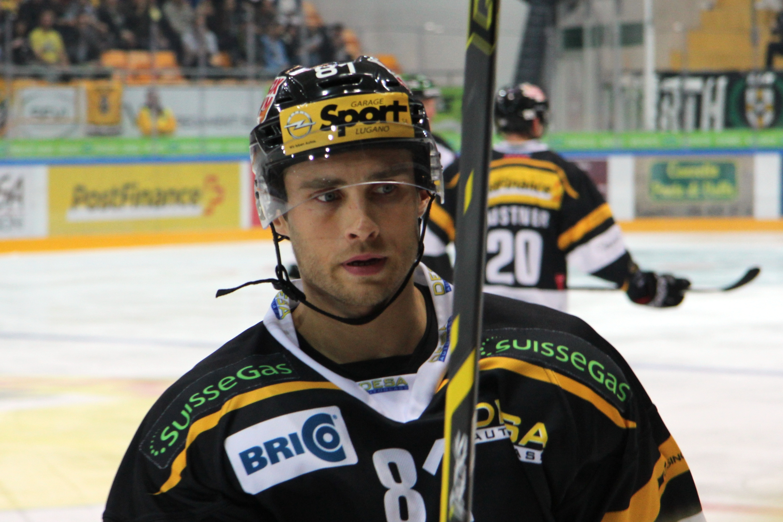 Ilari Filppula (L 81).